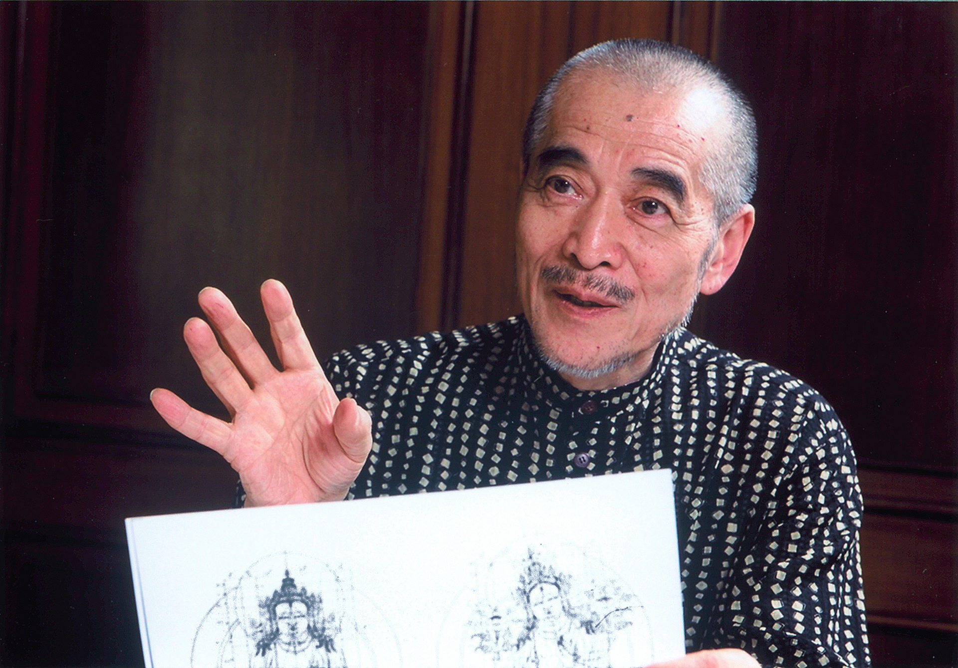 2003年8月、中国で撮影した杉浦康平のポートレート写真